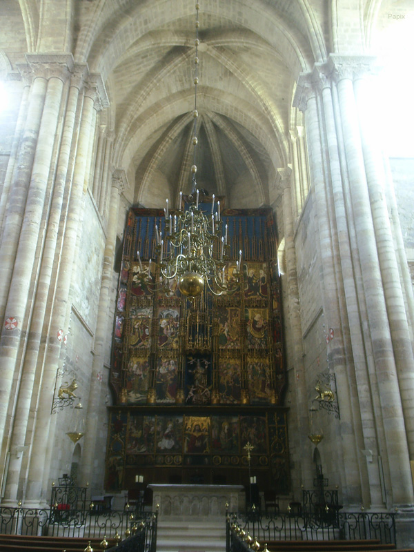 Altar mayor de la Catedral de Tudela Navarra España